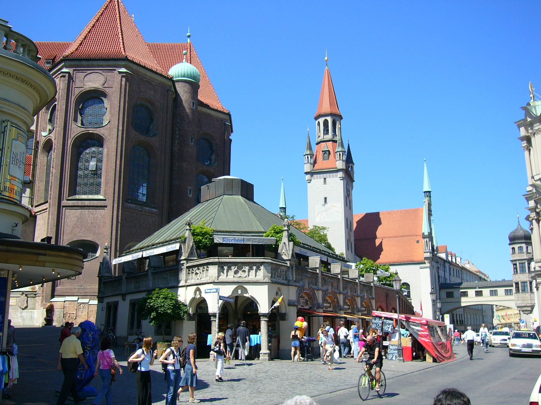 München - Die Metzgerzeile (Ecke Petersplatz) des Viktualienmarkts mit Blickrichtung auf St. Peter